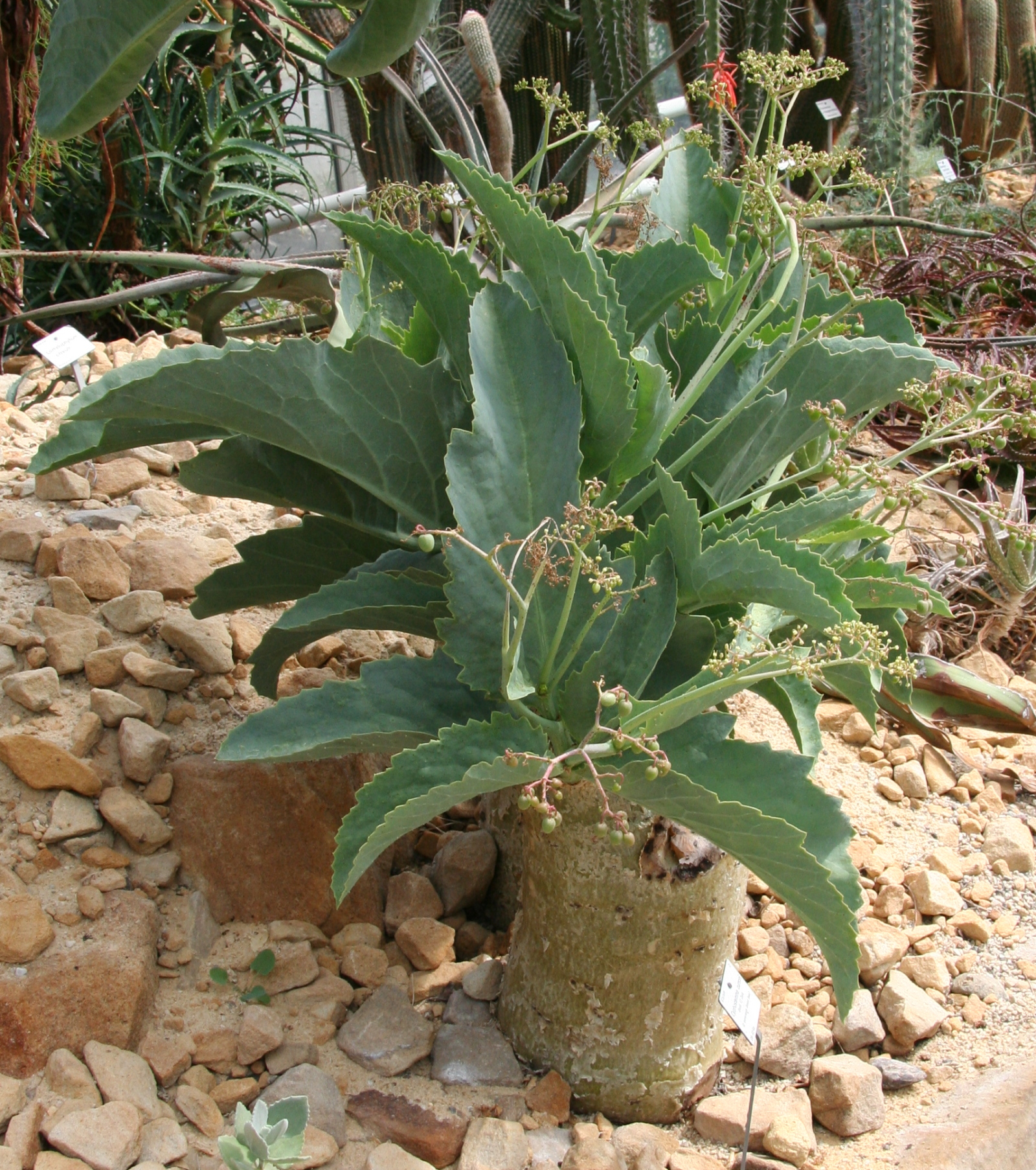 Cyphostemma juttae im Botanischen Garten Dresden